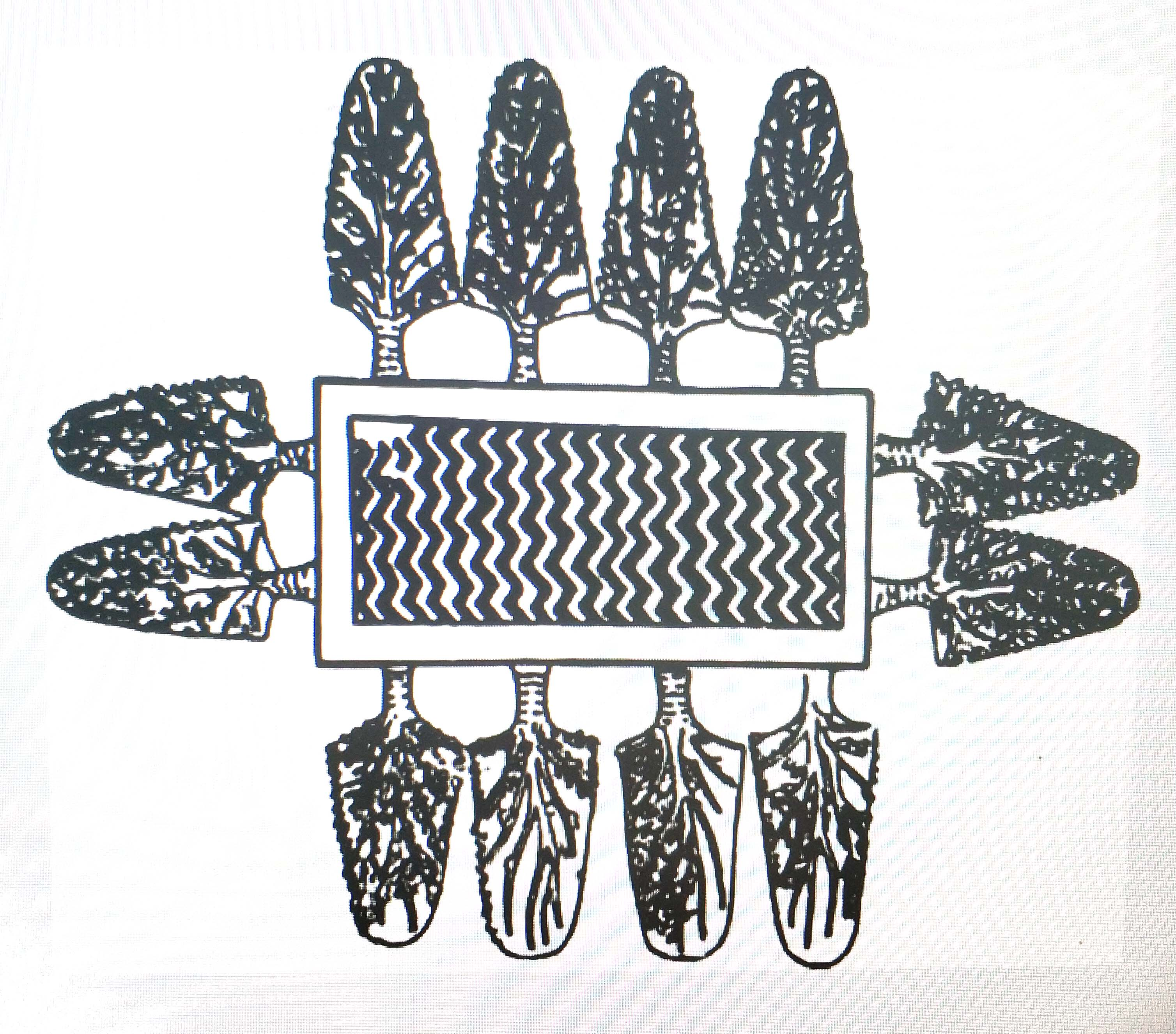 Пример древнеегипетского чертежа. На нем изображен водоема с растущими возле него пальмами.